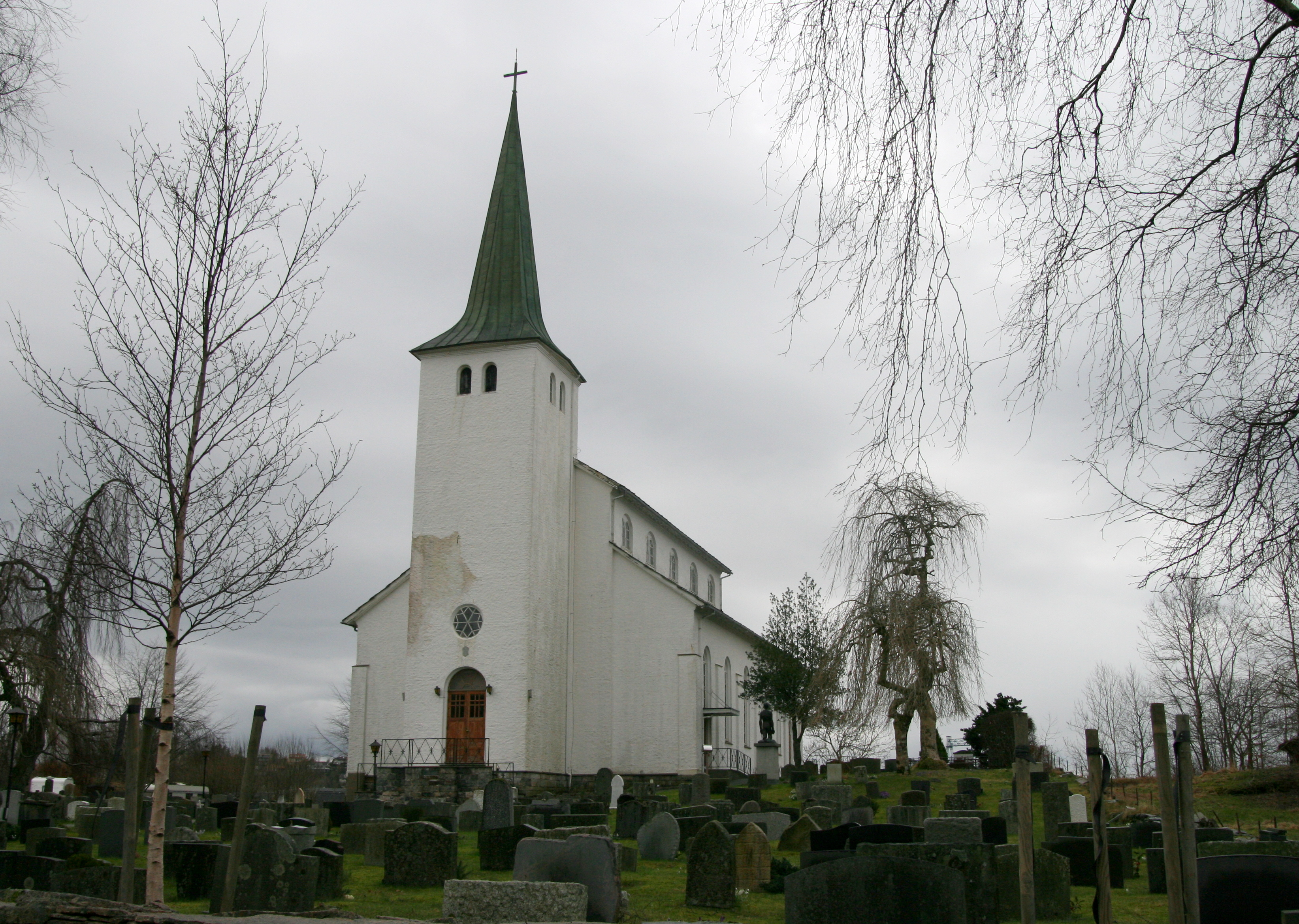 Stord kirke